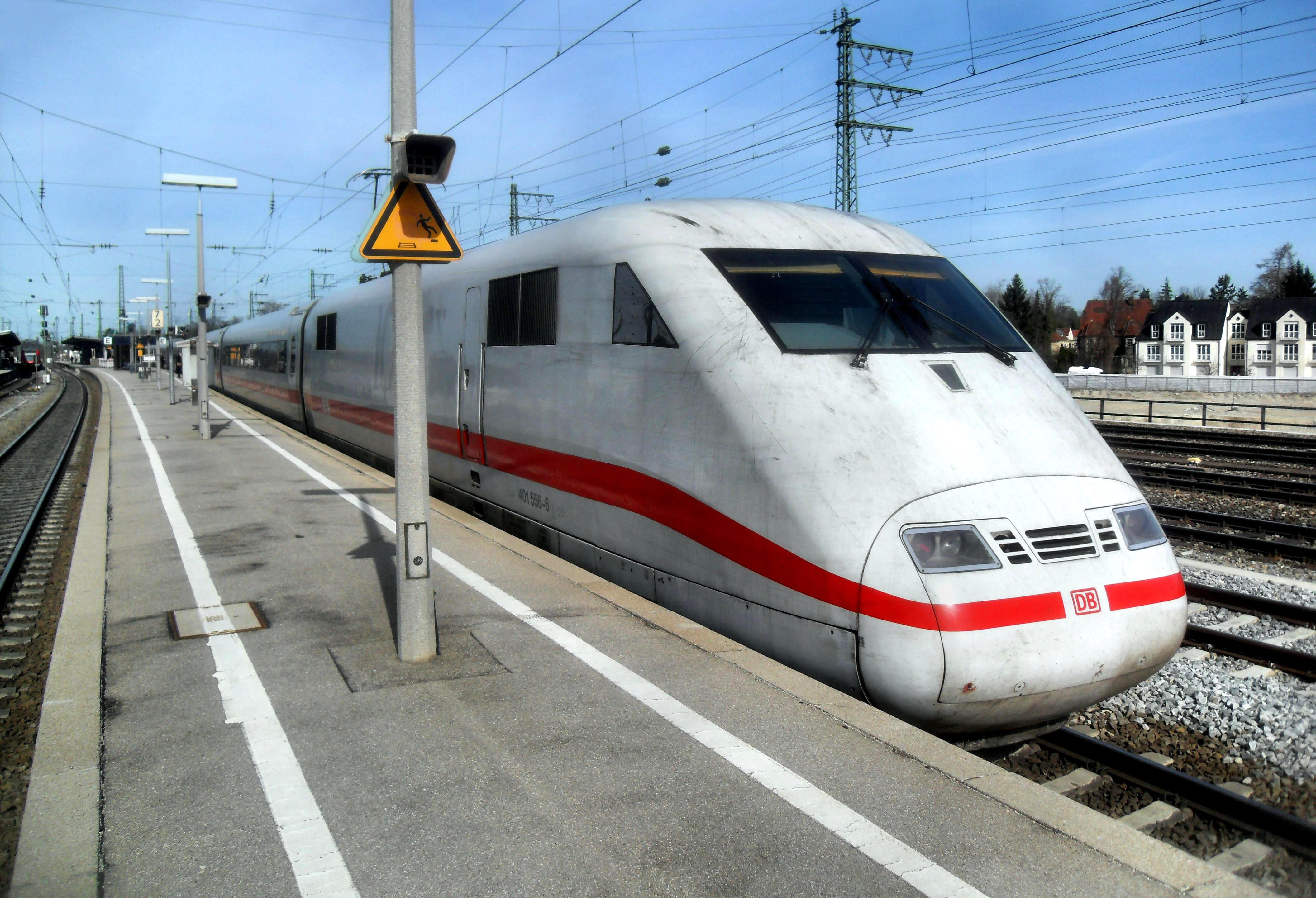 ICE 1 auf Gleis 9 des Bahnhofs München-Pasing in Bayern auf dem Weg nach Frankfurt am Main in Hessen (Deutschland)